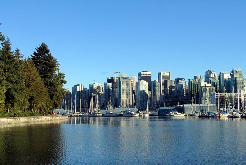 Downtown Vancouver mit Stanley Park